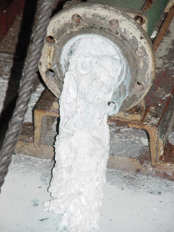 Koaguation einer nicht ausreichend scherstabilen Polymerdispersion in einer Exzenterschneckenpumpe.